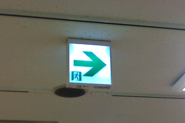 Exit sign(避難経路の標識4)